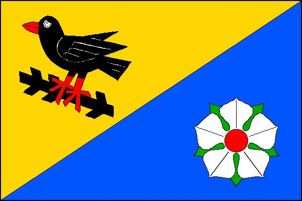 Vlajka obce Vranová